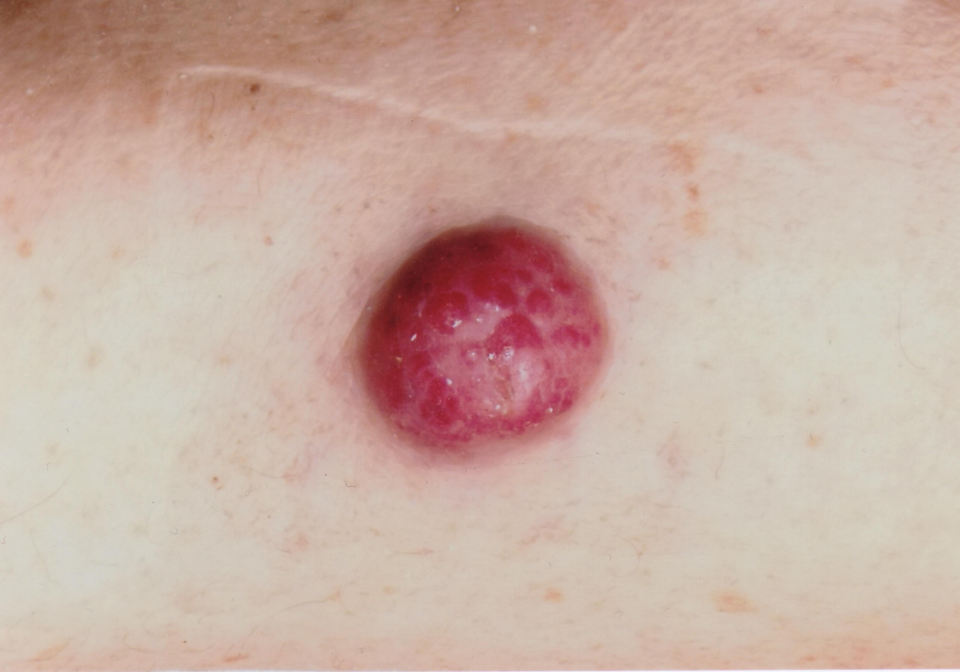 Carcinome à cellules de Merkel de la face antérieure de l'avant-bras ; collection personnelle